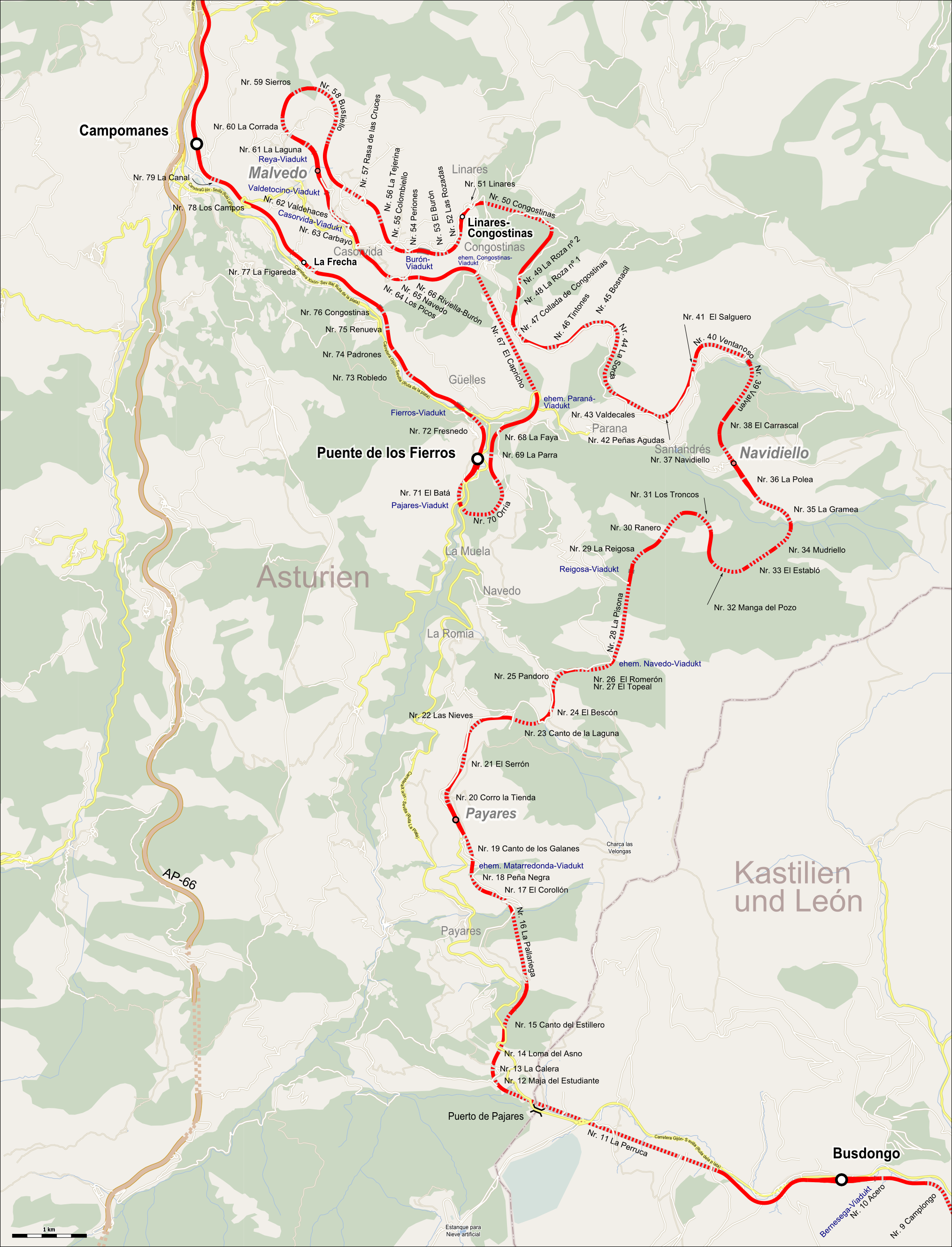 Karte der Streckenentwicklung an der Pajares-Nordrampe